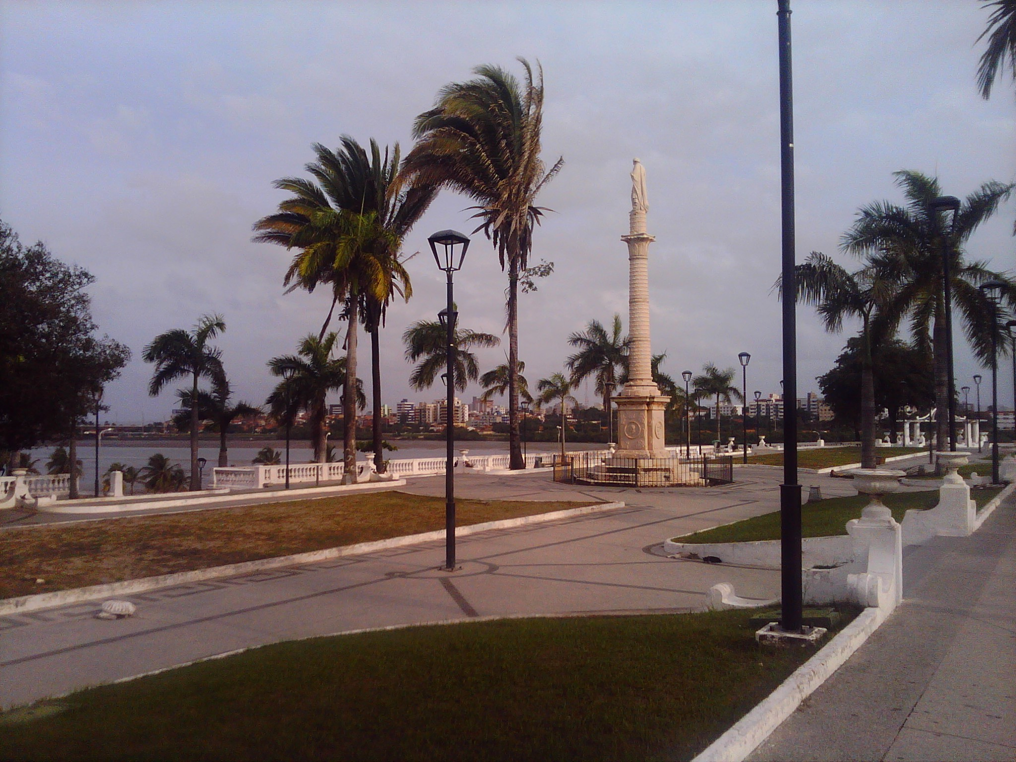 Praça Gonçalves dias - São Luís - Maranhão